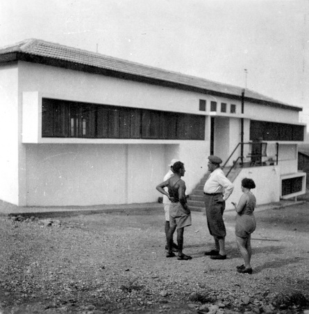 בית קרקובר. עומד במרכז המהנדס קרקובר; 1935 - חפציבה-2